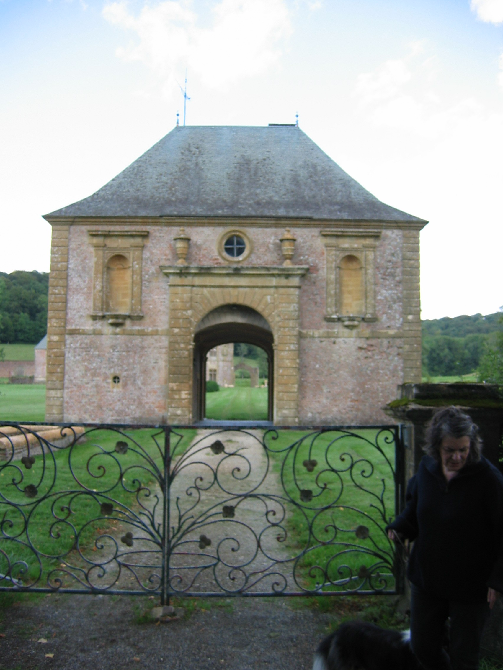 Pavillon d'entrée de la Chartreuse du Mont-Dieu, Ardennes, France